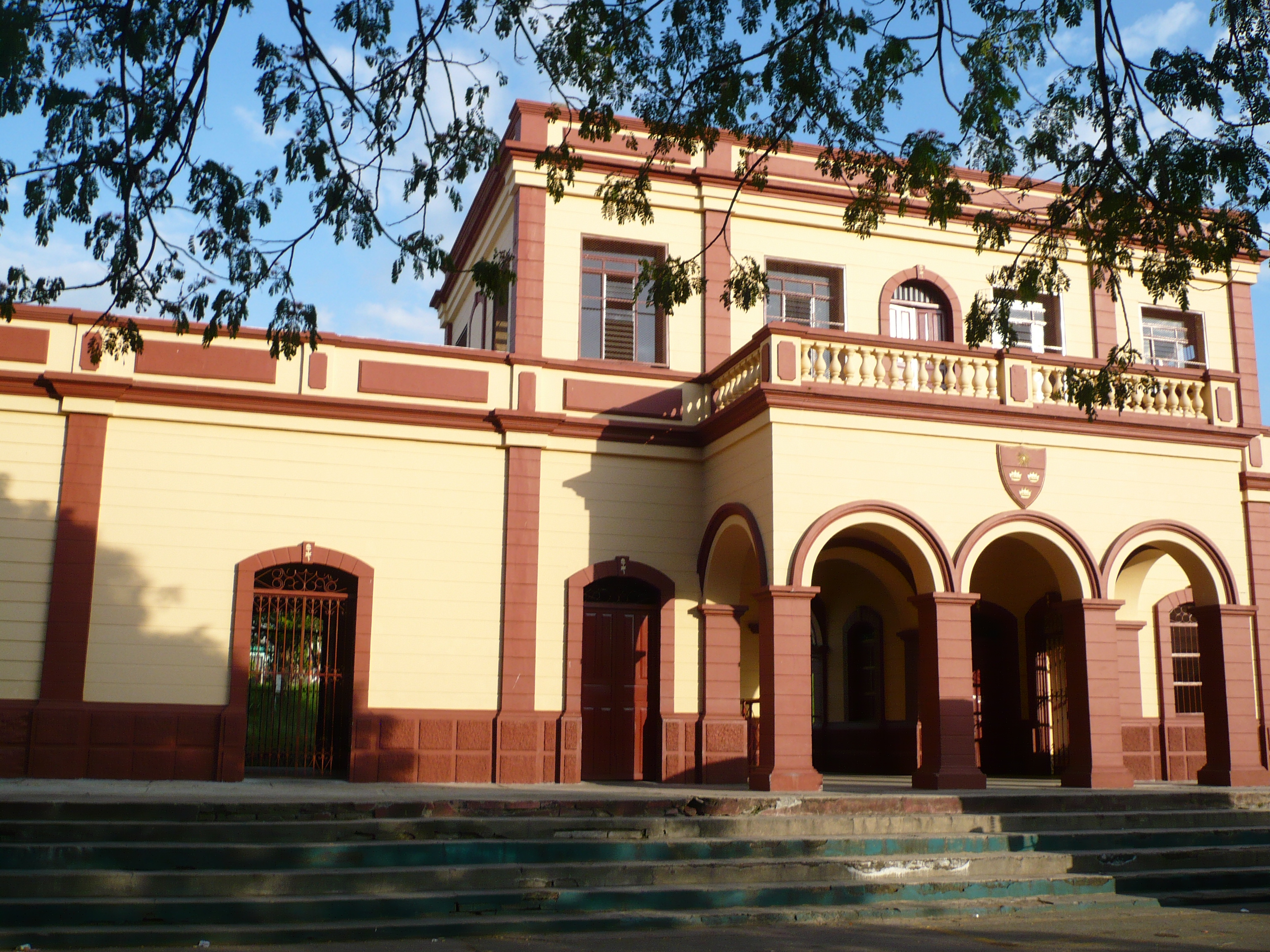 Antigua Estación del ferrocarril. Cartago, Valle, Colombia.